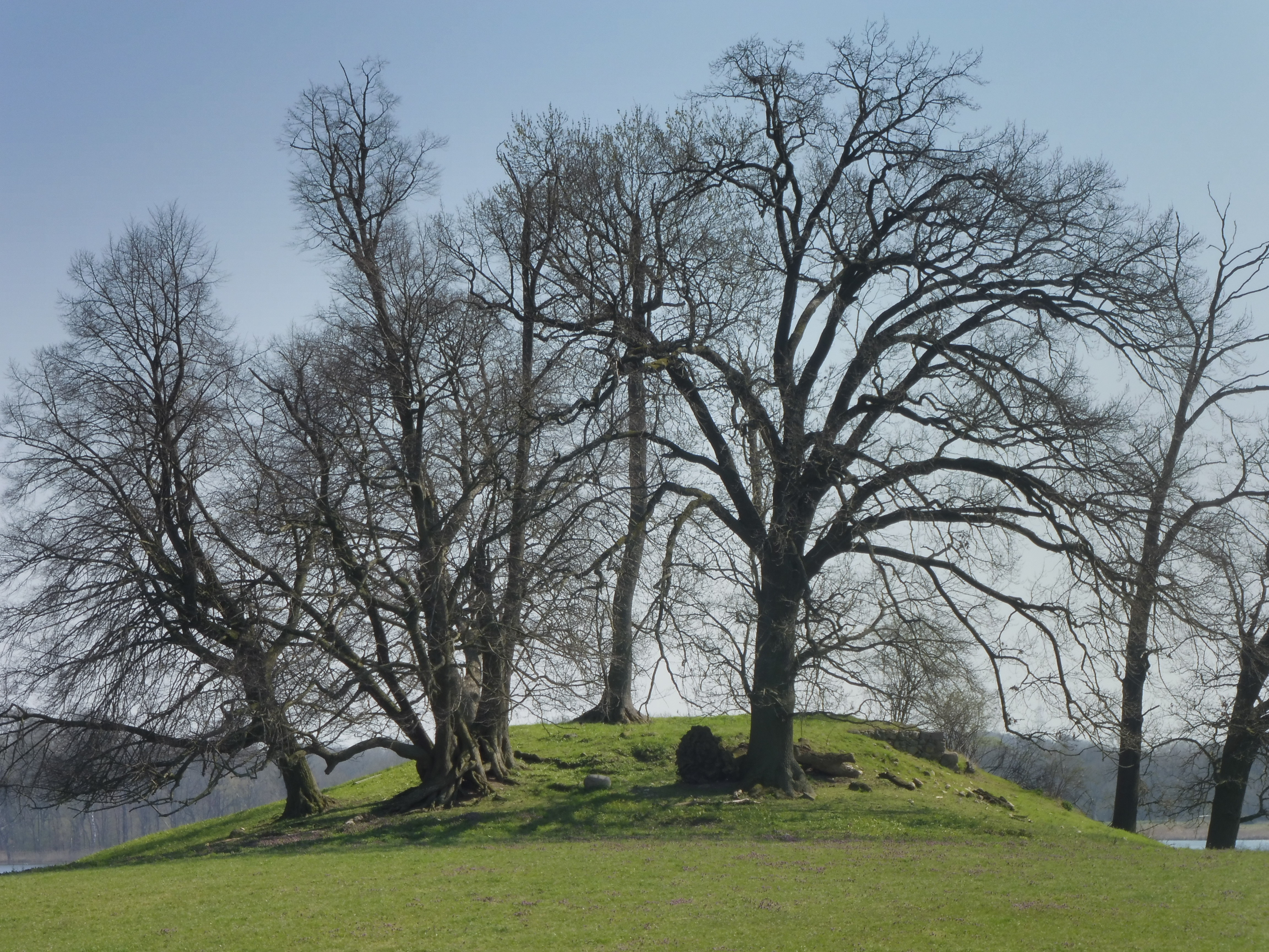 Einer von mehreren Turmhügeln aus der Zeit der Flotow (Adelsgeschlecht) um 1346 beim Flachwassersee in Stuer